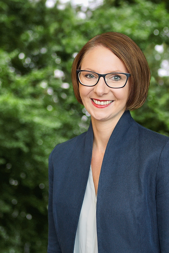 Sandra Boser, Abgeordnete des Landtags von Baden-Württemberg